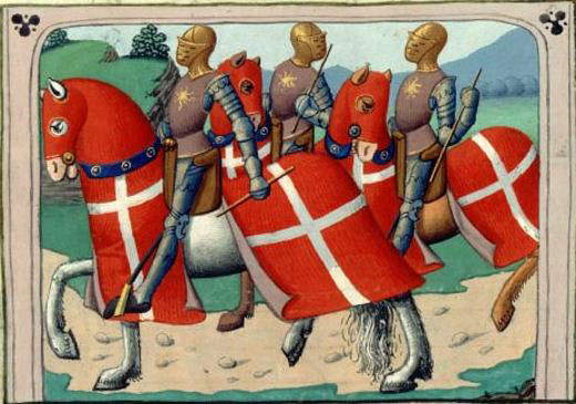 Dunois, Brézé et Jacques Coeur au cours de la campagne de Guyenne, par Martial d'Auvergne, enluminure issue de l'ouvrage Vigiles de Charles VII, Paris, France, XV°siècle.